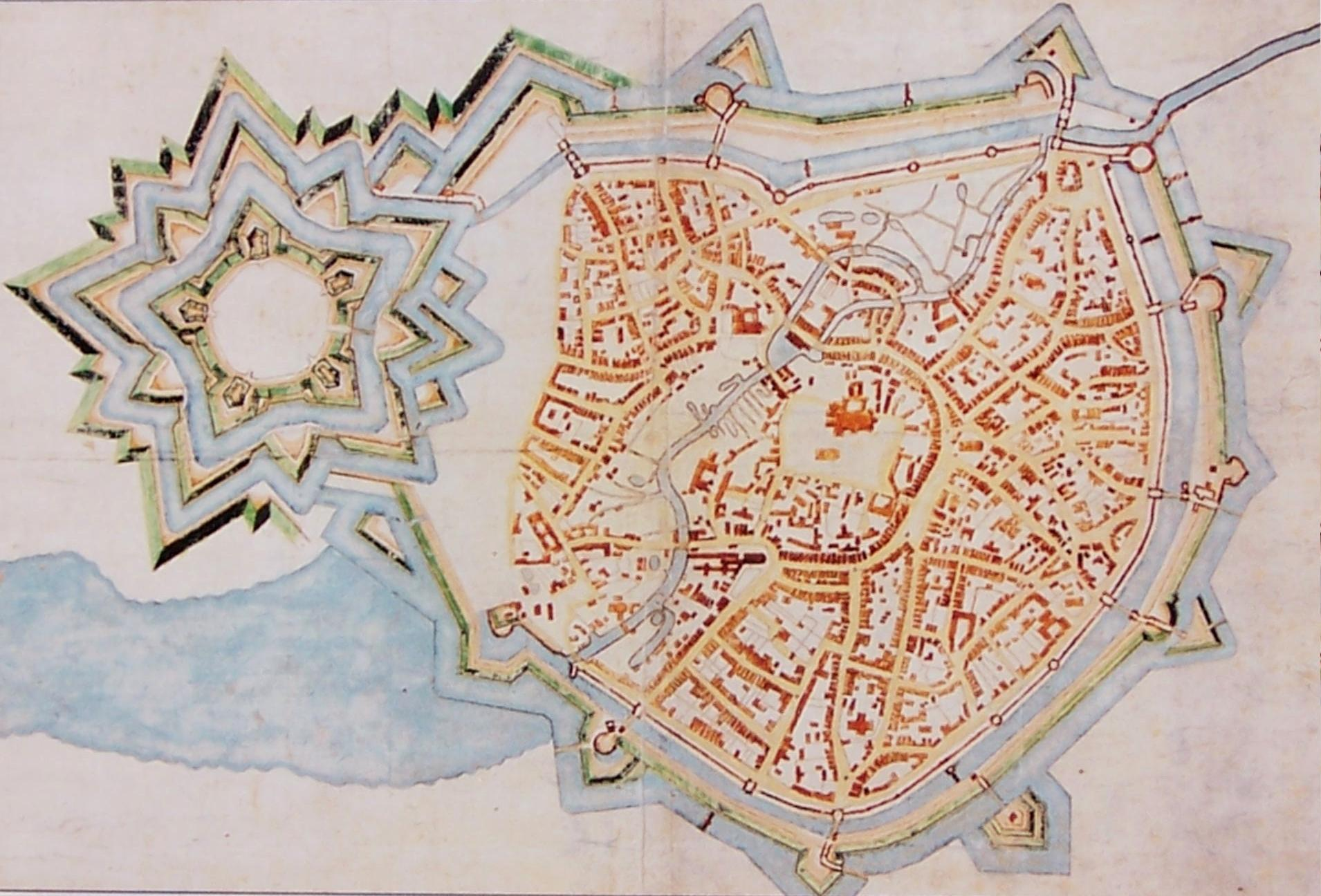 Federzeichnung von Peter Pictorius d. Ä.; um 1680. Aus: Münster im Wandel der Zeit, Band 1 "Reiche Vergangenheit" S. 18, Waanders-Verlag Zwolle - Stadtarchiv Münster in Zusammenarbeit mit dem Stadtmuseum Münster und dem Westfälischen Museum für Kunst und Kulturgeschichte, 2000, ISBN 90 400 1246 6